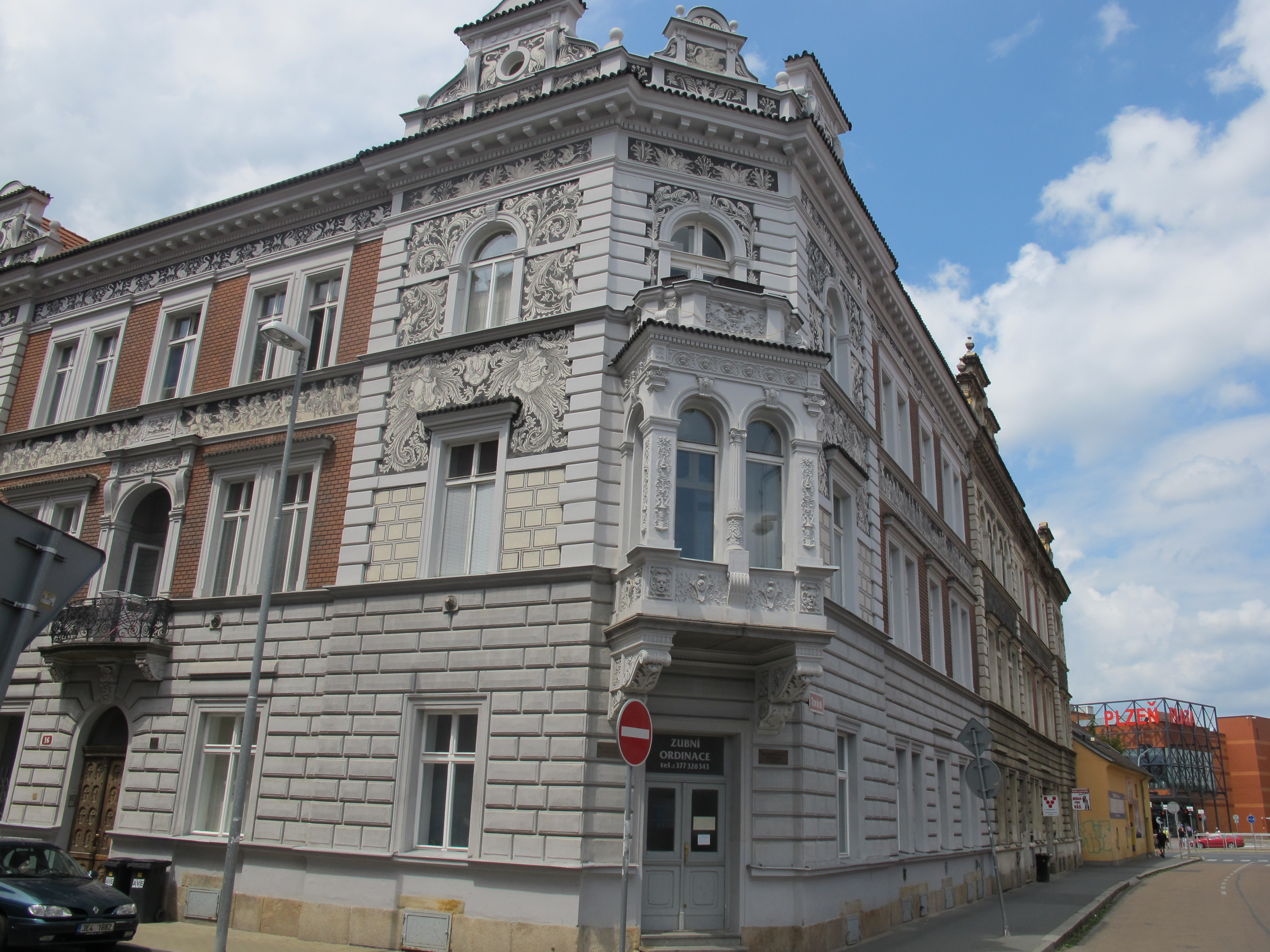 Tovární 107/8, Kollárova 107/16, Plzeň 3-Jižní Předměstí - sgrafita M. Alše na průčelí